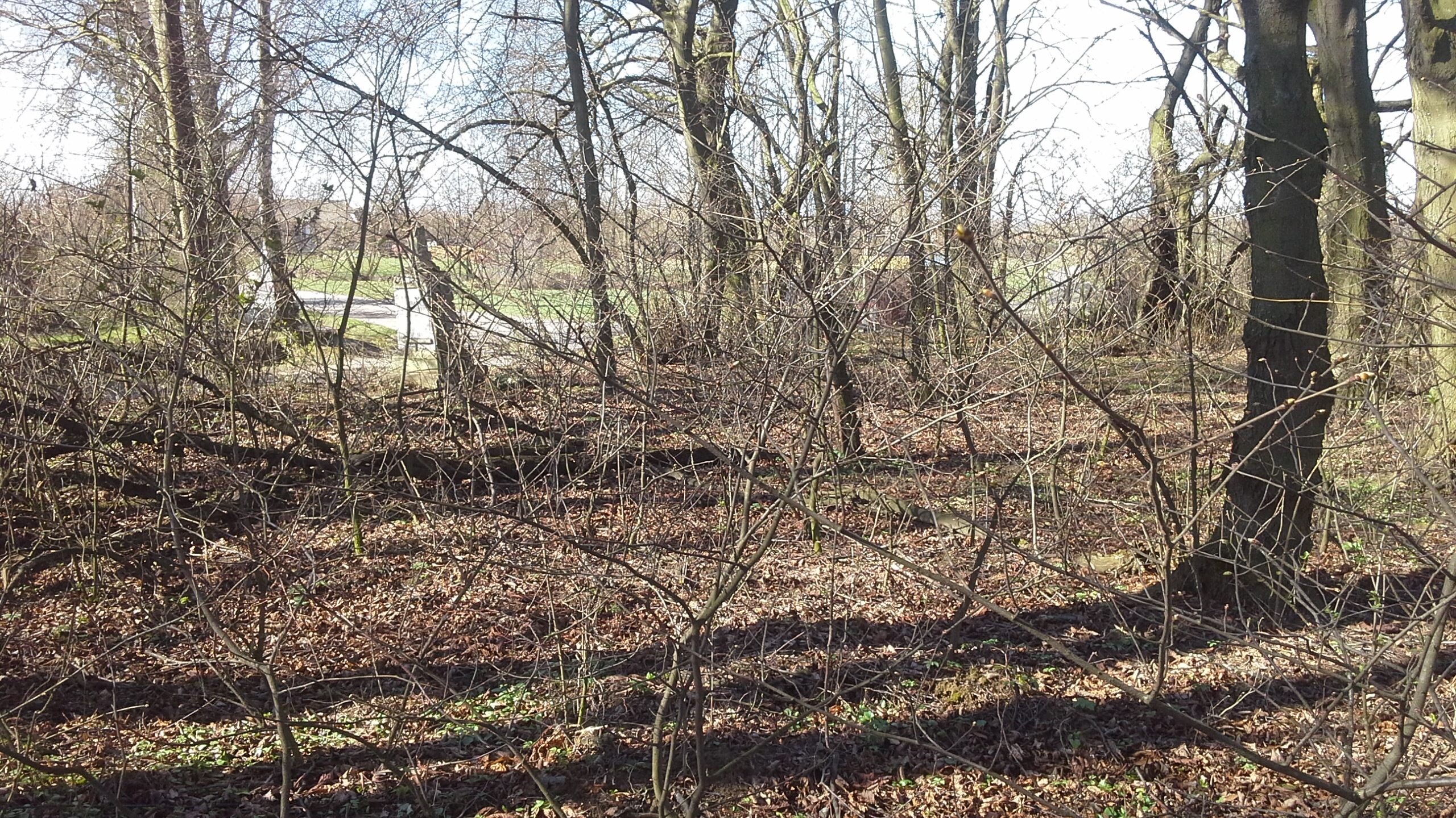 Cmentarz prawosławny w Brodzicy